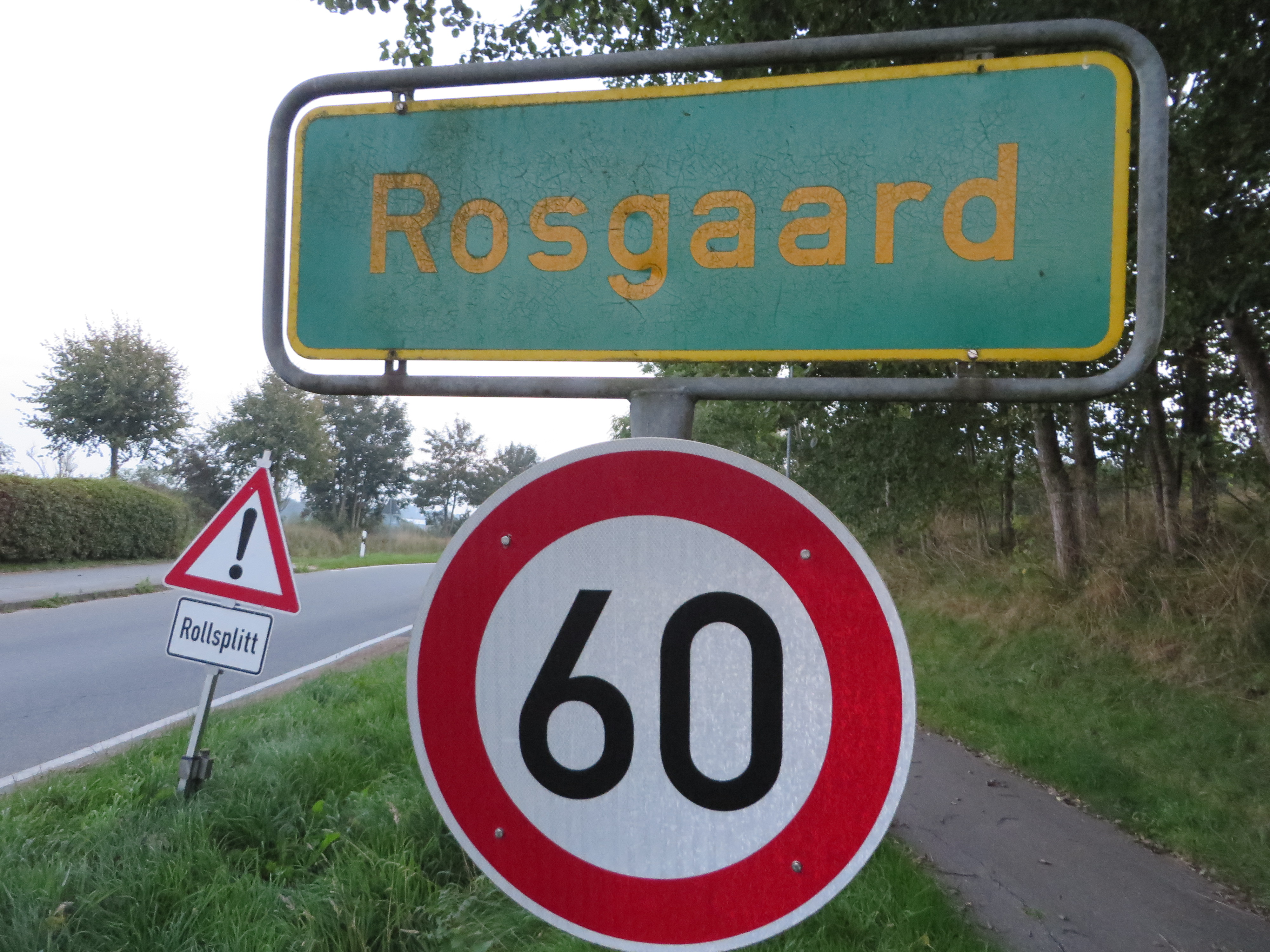 Ortshinweistafel Rosgaard, Bild 01